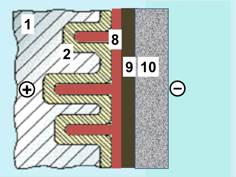 Prinzipielle Elko-Aufbau eines SAL-Elkos mit Graphit-Silber-Kathodenkontaktierung